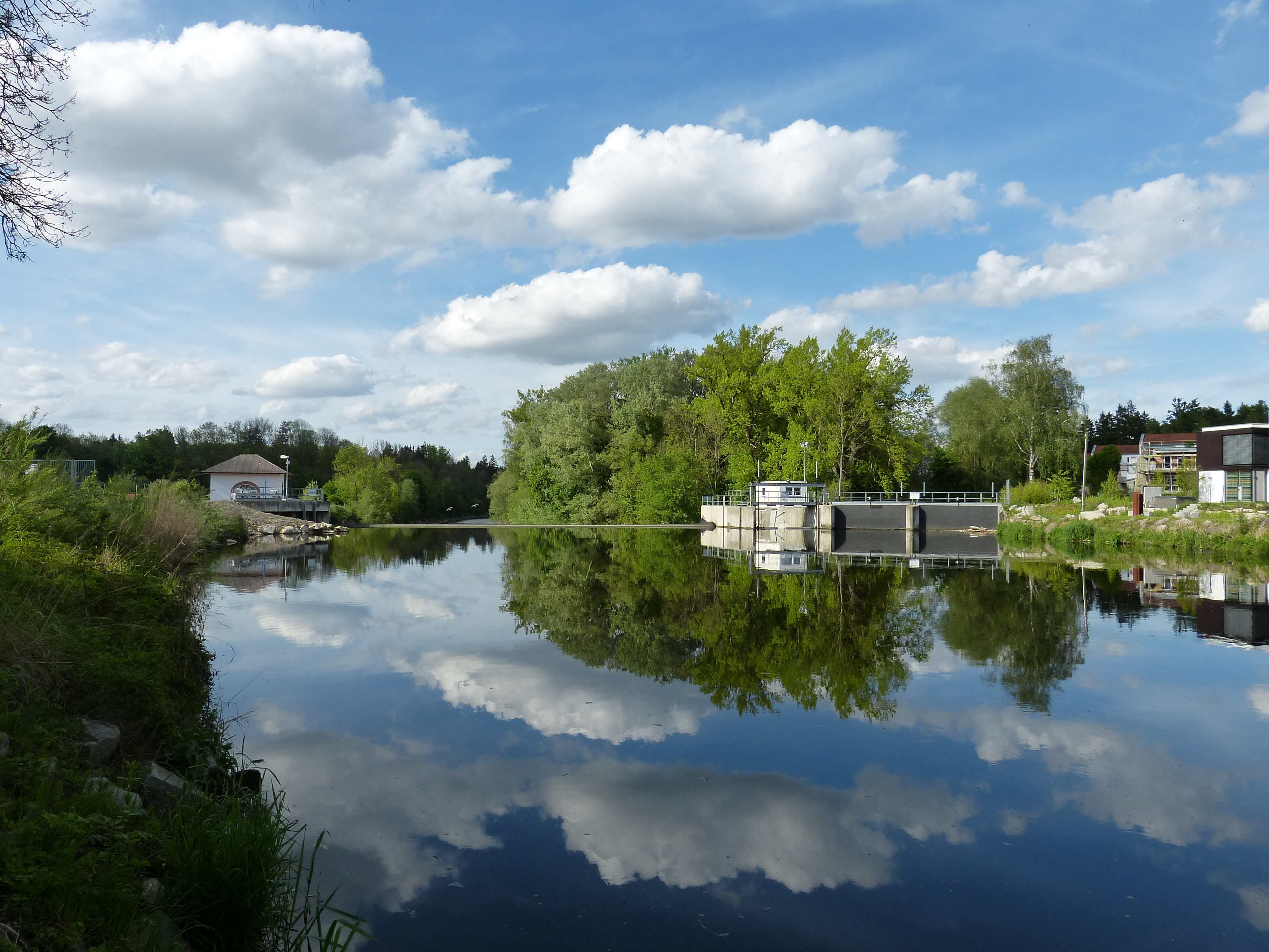 Das Ackermannwehr der Wertach (Beginn des Fabrikkanals) in Augsburg-Göggingen.